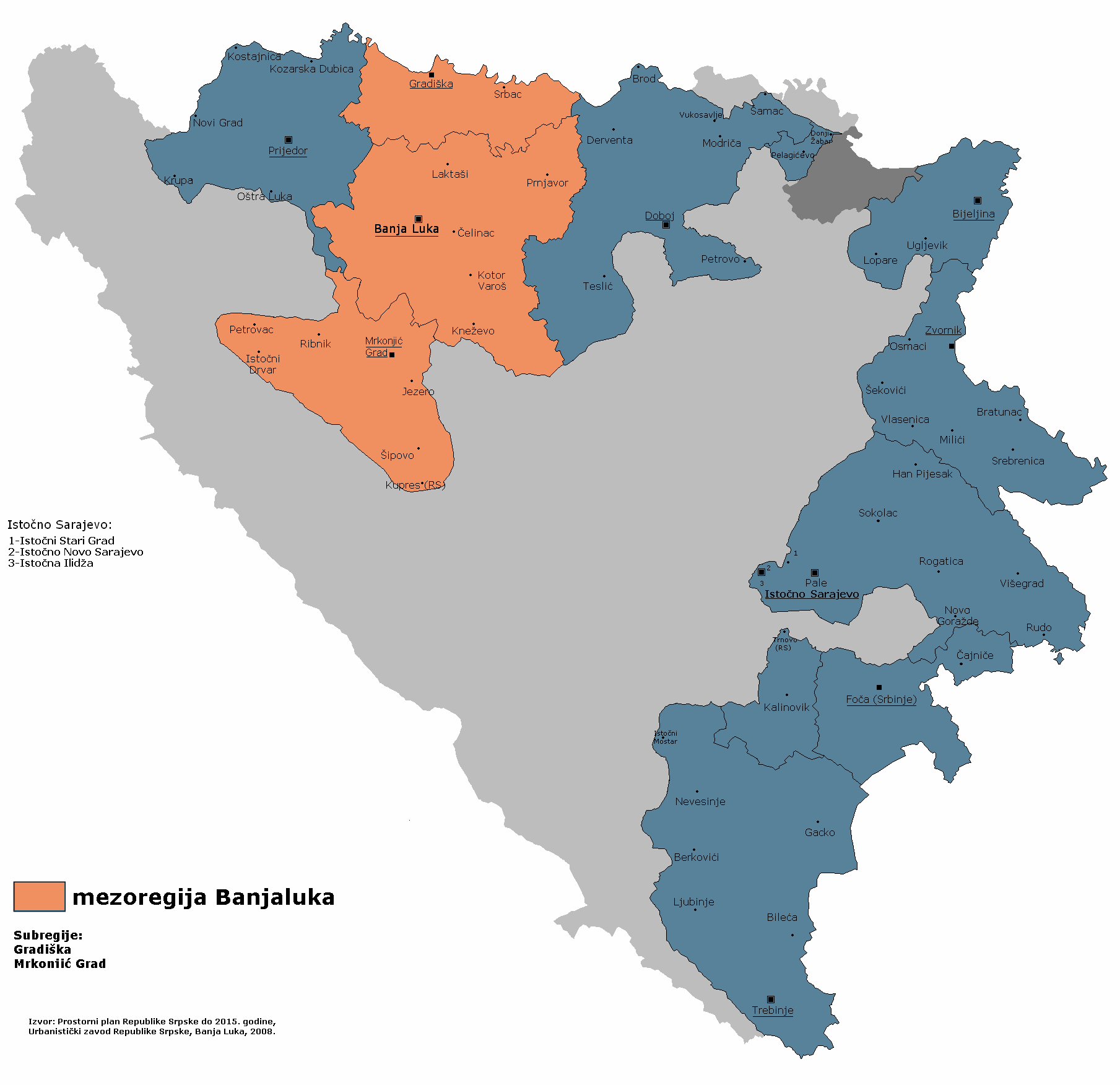 Мезорегија Бања Лука према Просторном плану Републике Српске